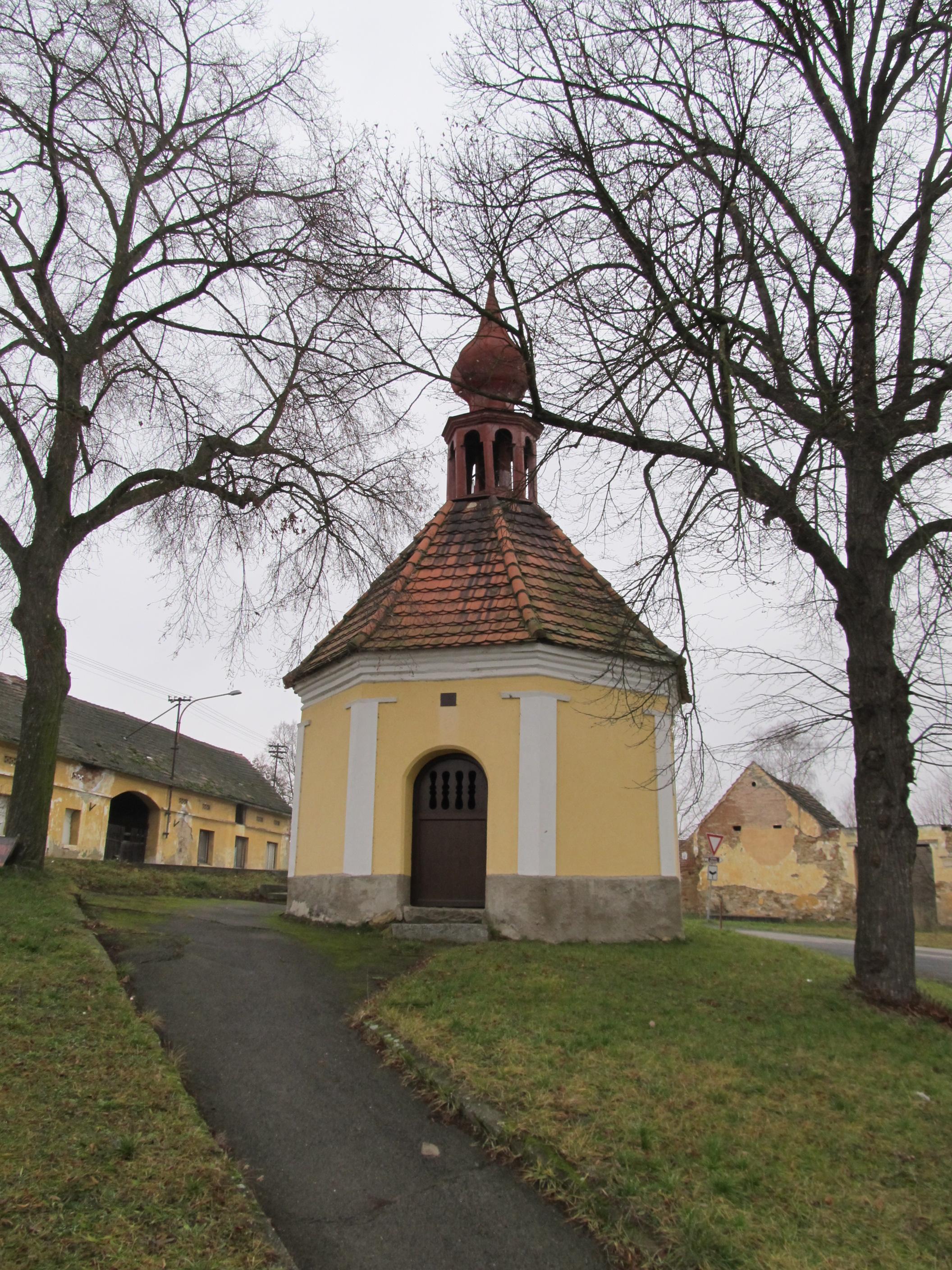 Líšina - kaple Povýšení Svatého Kříže